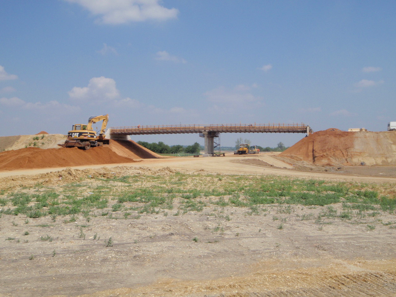 M86 im Bau bei Ölbő 21.07.2010